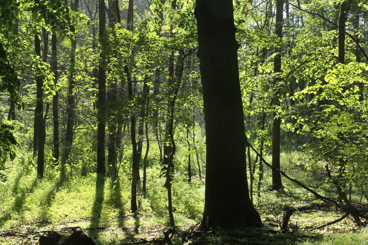 NSG Jederitzer Holz